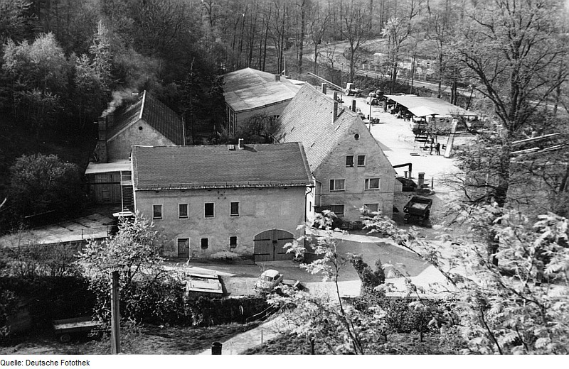 Original image description from the Deutsche FotothekTriebischtal-Roitzschen. Neidmühle, Blick vom Felsen auf die Mühle